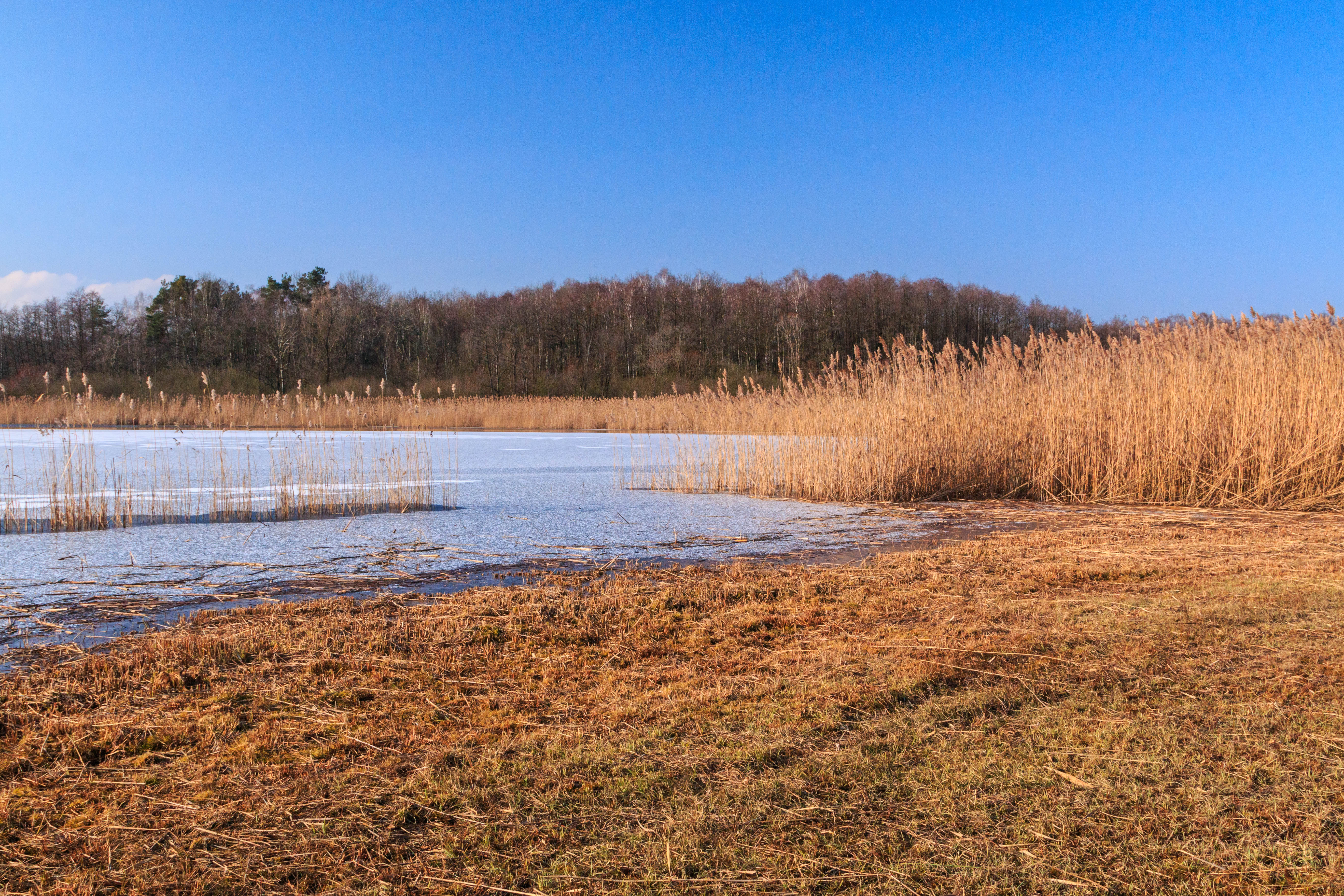 rákosiny u rybníka Matka